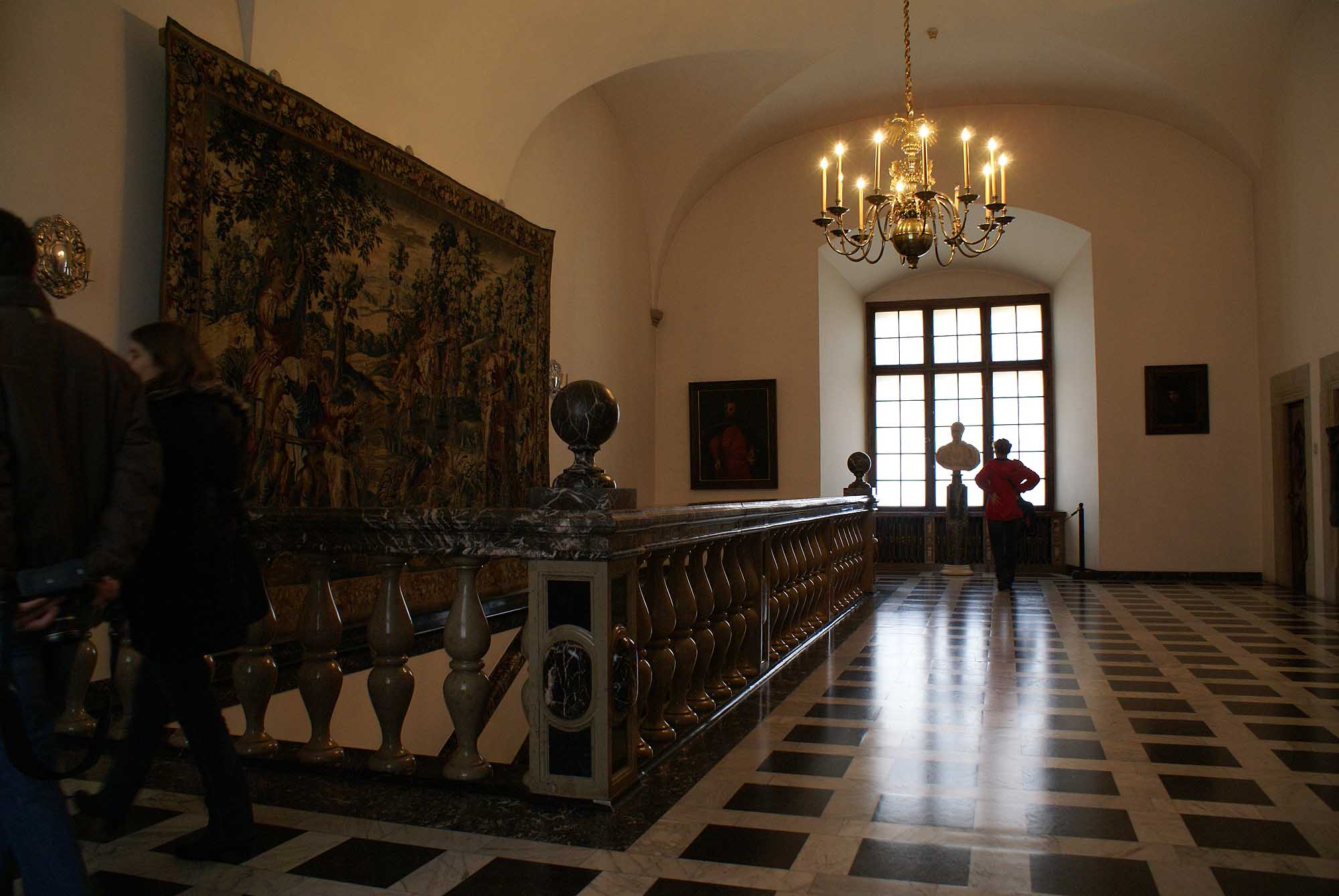 Kraków, zespół Wzgórza Wawelskiego